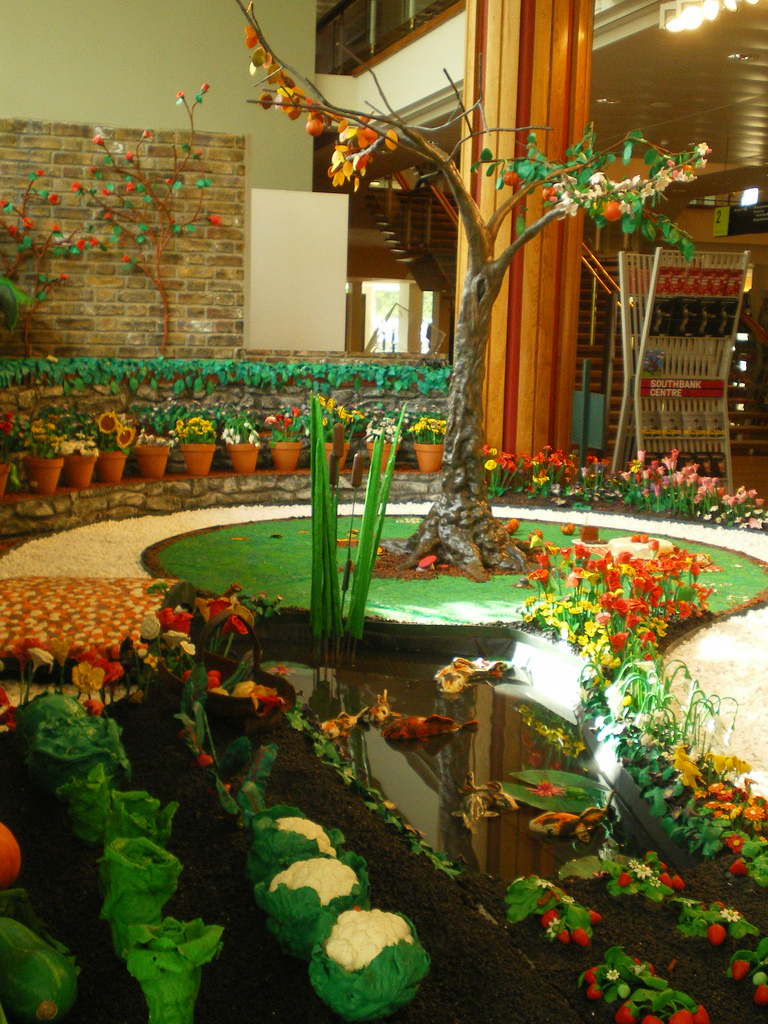 Centrepiece